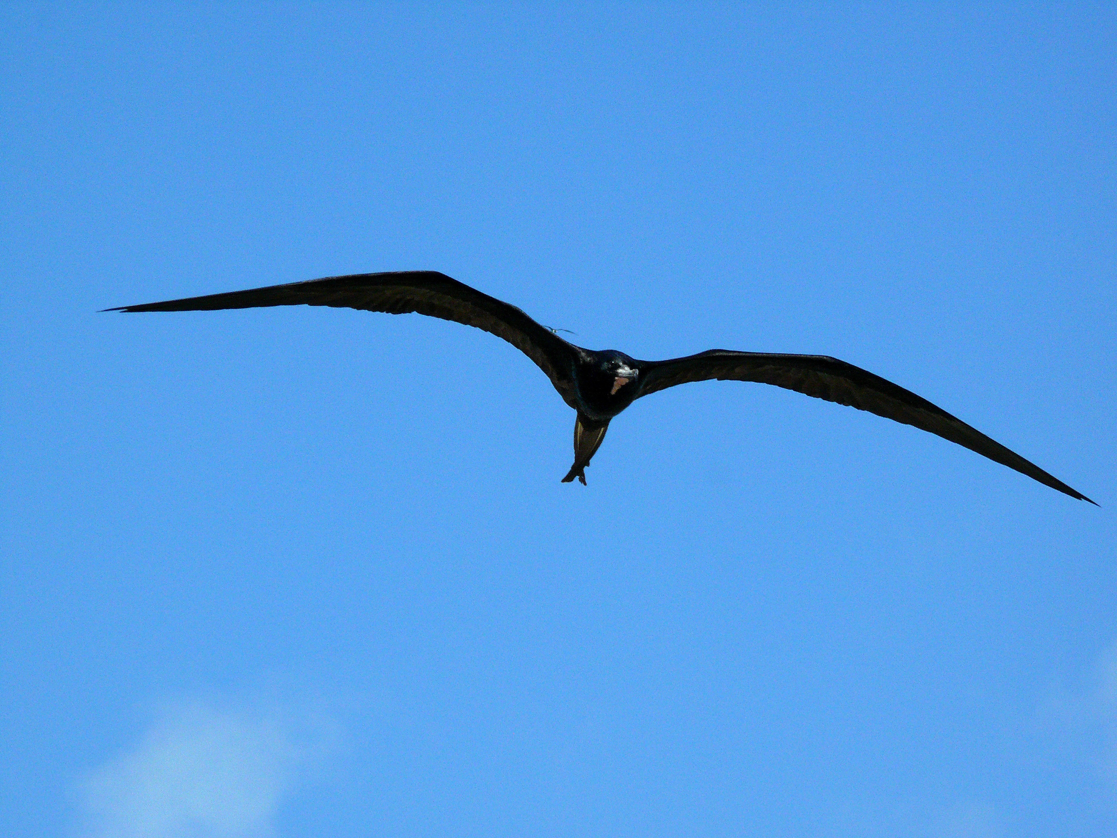 Caye Caulker, BELIZE